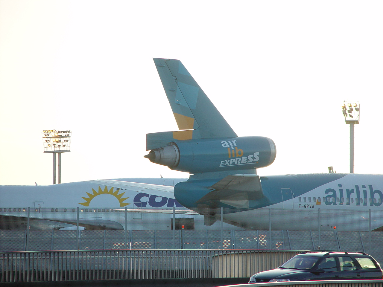 DC10-30 à Paris-Orly - Février 2003 - photo Mr Mehdi OUICI